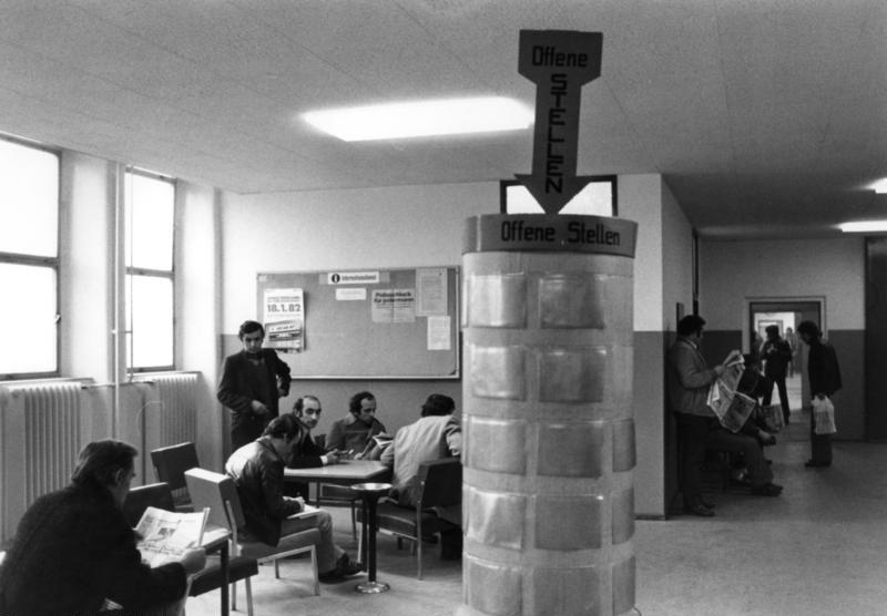 8.2.1982 Berlin (West) Arbeitslose im Arbeitsamt II, Sonnenallee 262